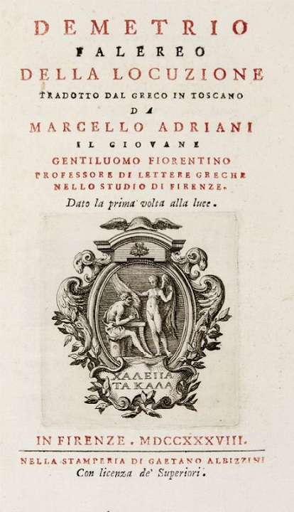 Della locuzione di Demetrio Falereo, tradotto dal greco in italiano da Marcello Adriani il Giovane